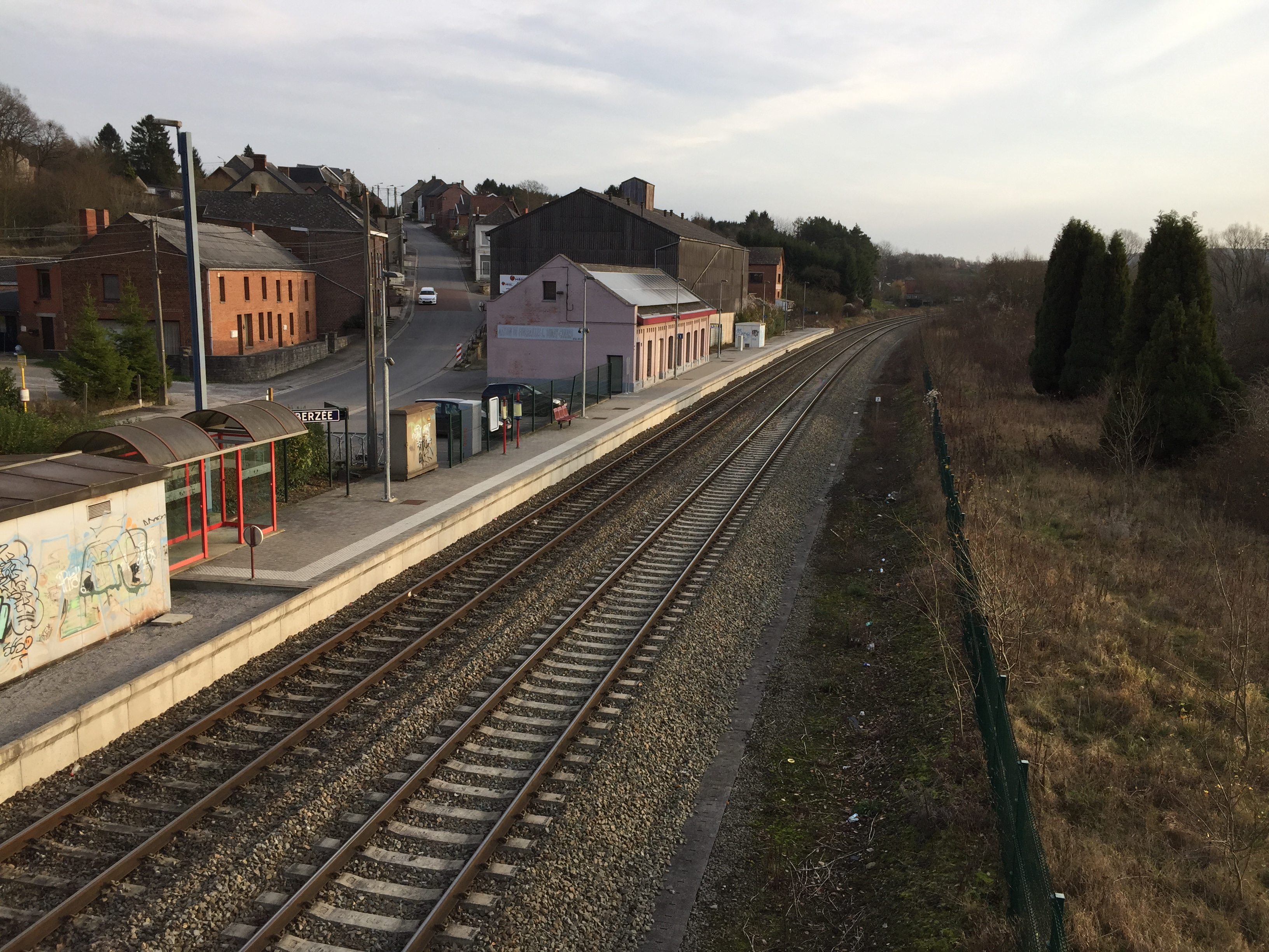 Gare de Berzée - Vue générale